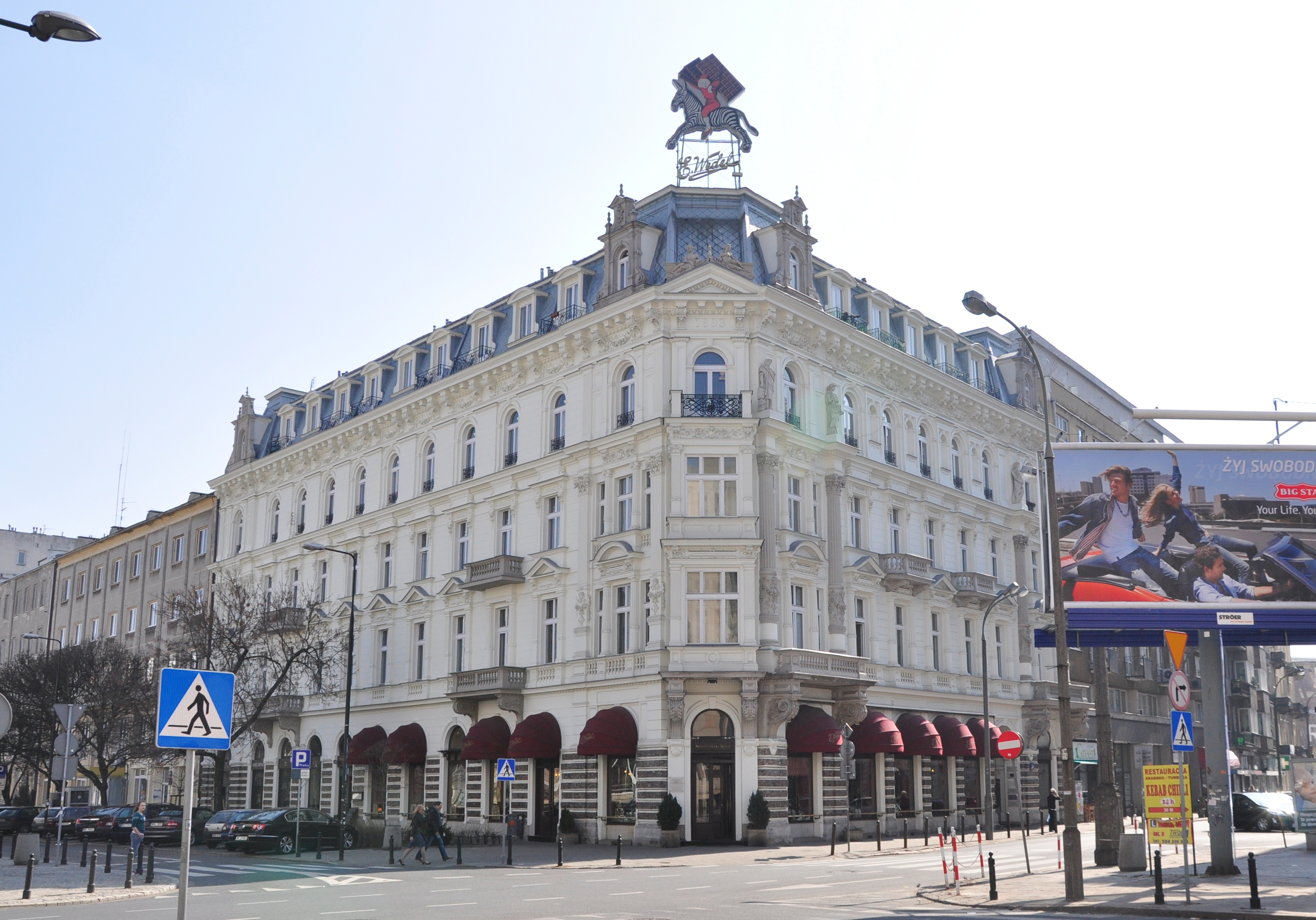 Warschau, Wedel-Cafe